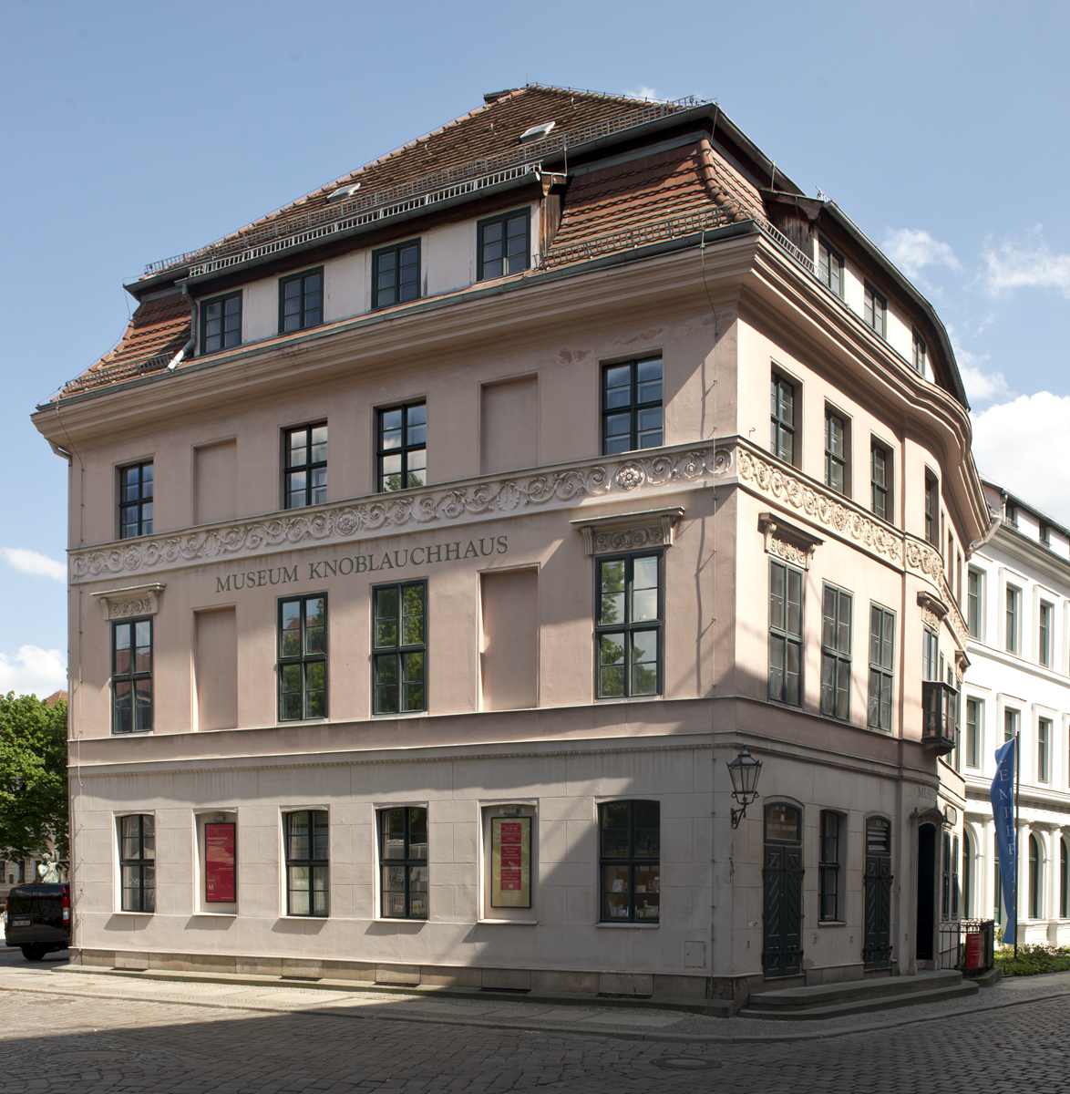 Foto: Oliver Ziebe